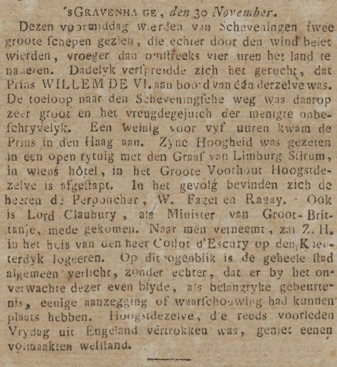 Bericht in de Gravenhaagsche Courant d.d. 1 december 1813 over de aankomst van prins Willem Frederik (Willem VI) in Scheveningen